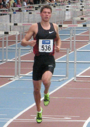 Erik Balnuweit beim DLV WM-Testwettkampf 2011 im Stadion der MTG Mannheim.